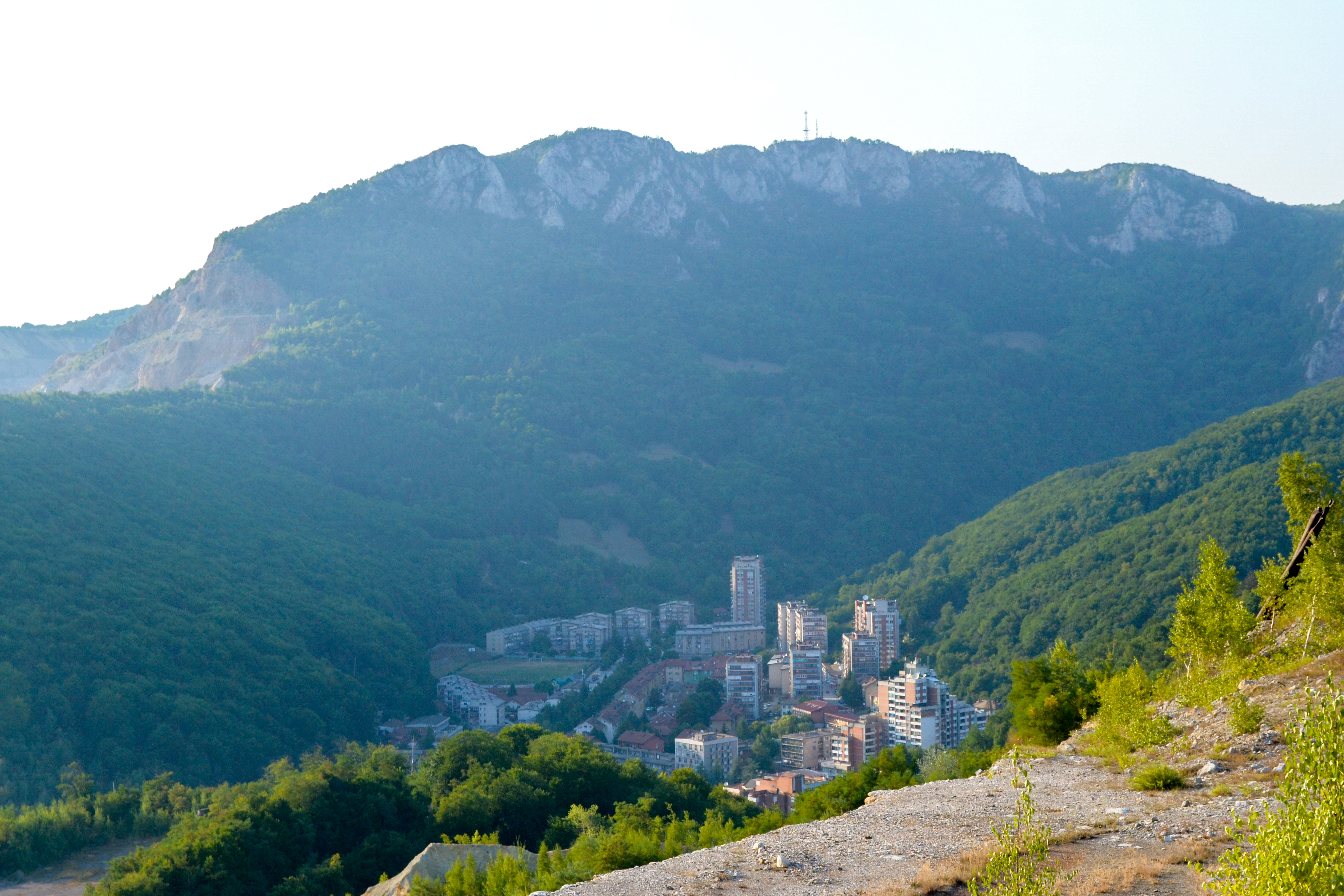 Majdanpek slikan sa partizanskog puta